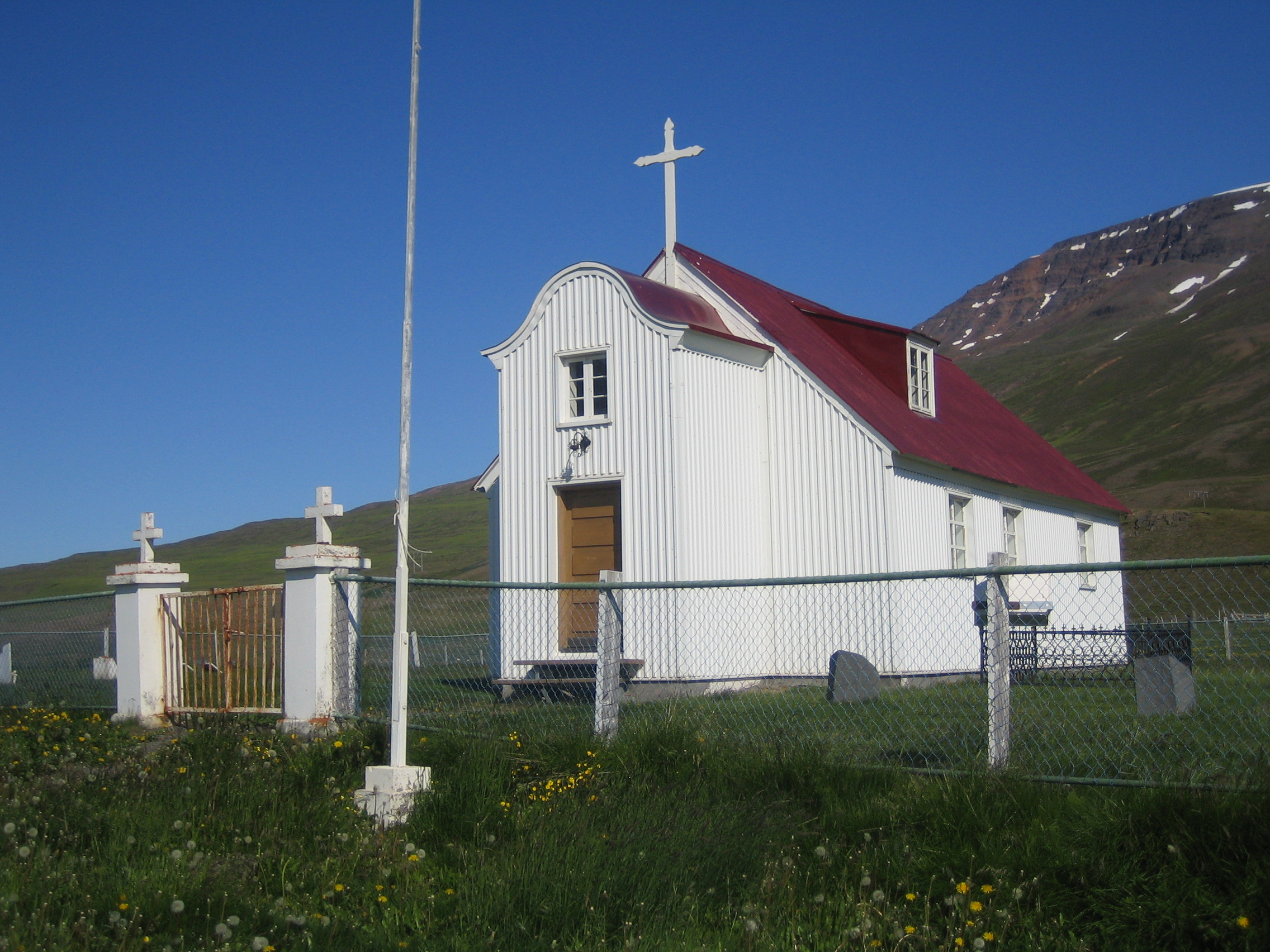 Bægisárkirkja er í Möðruvallaprestakalli í Eyjafjarðarprófastsdæmi. Timburhús reist 1858.